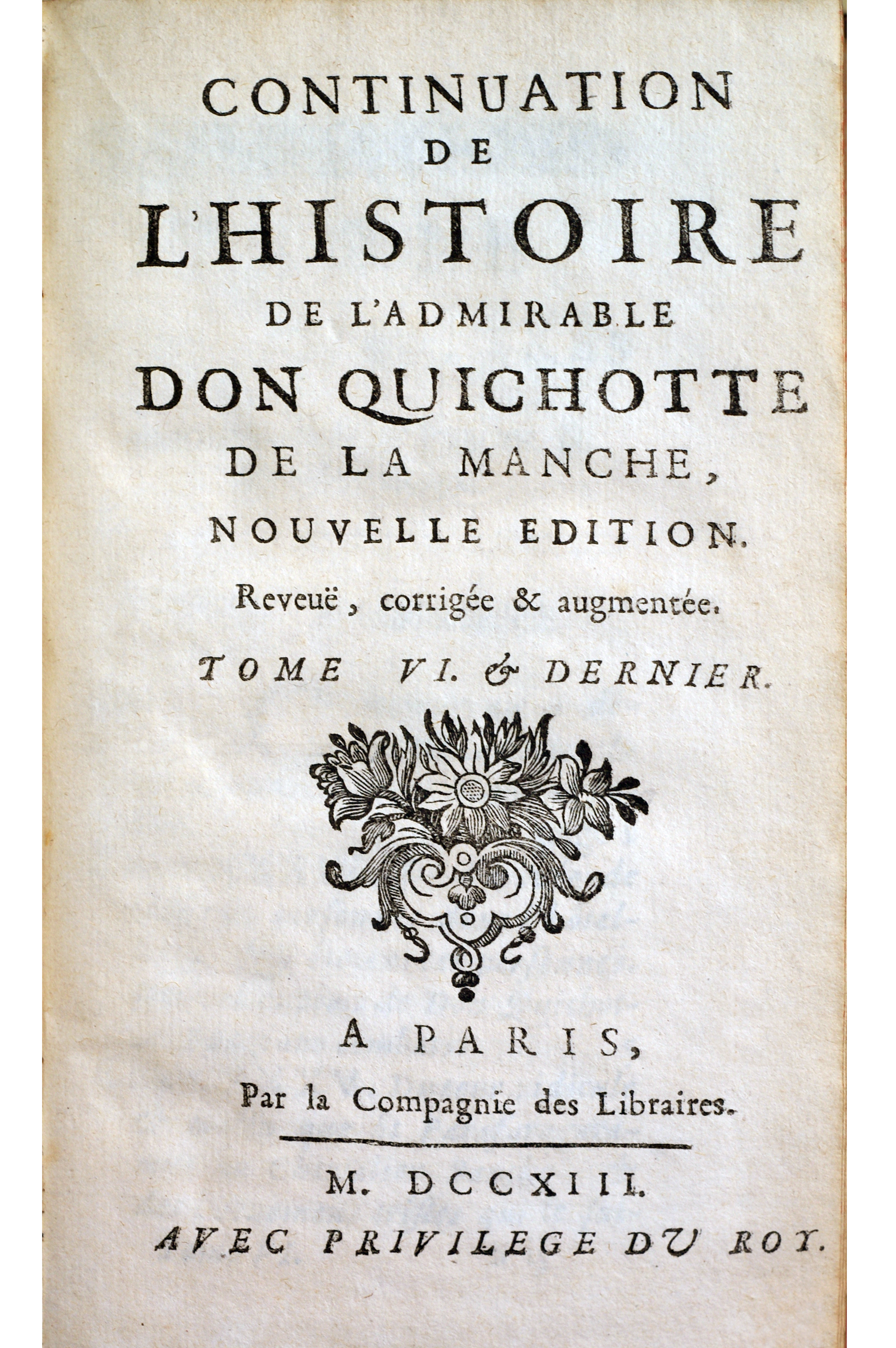 Robert Challe, Histoire de Don Quichotte, page de titre